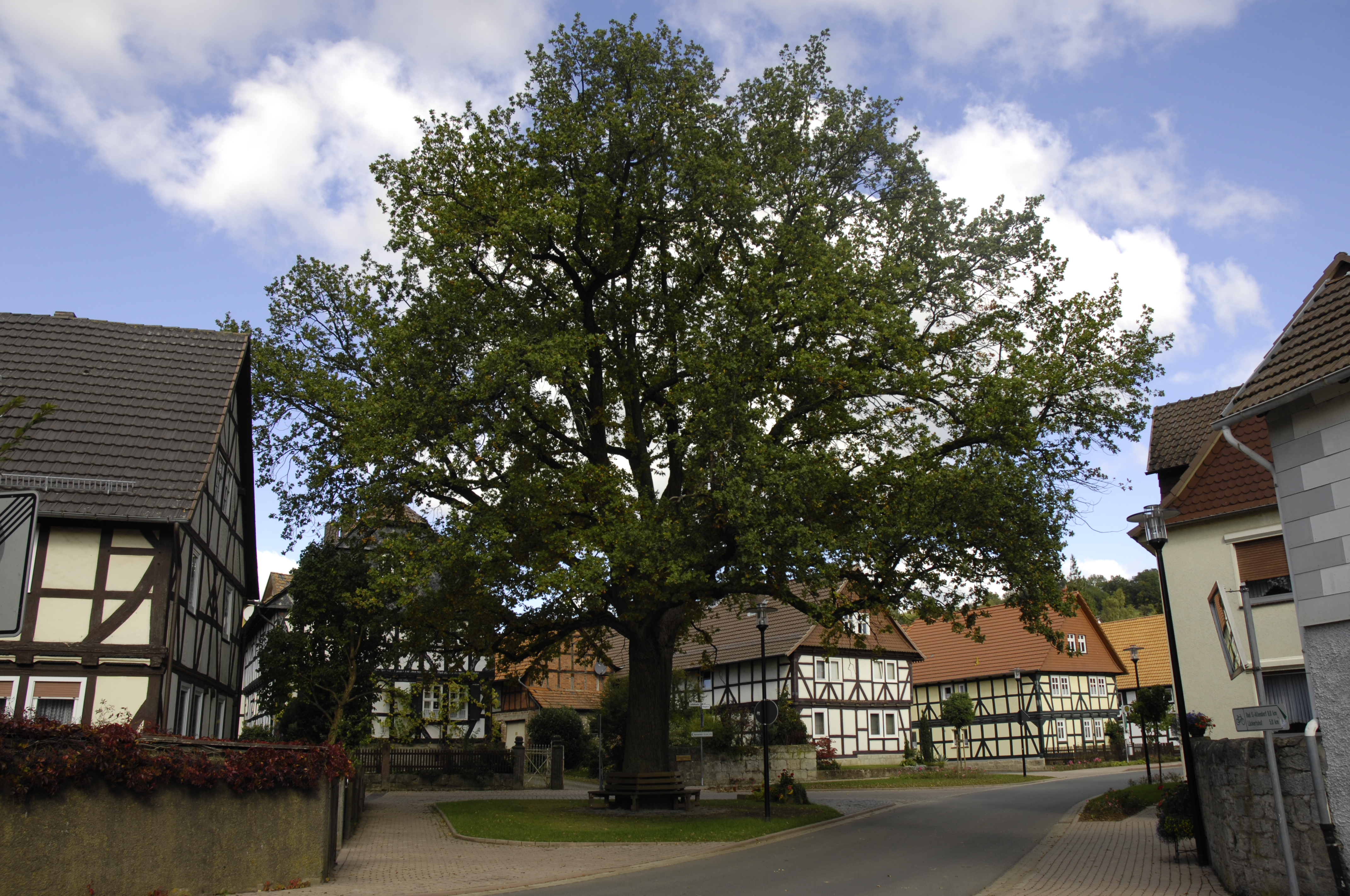 Orferode, Werra-Meißner-Kreis, Ortsmitte mit schönen Fachwerkhäusern und herrlichem Baumbestand; Naturdenkmal Friedenseiche